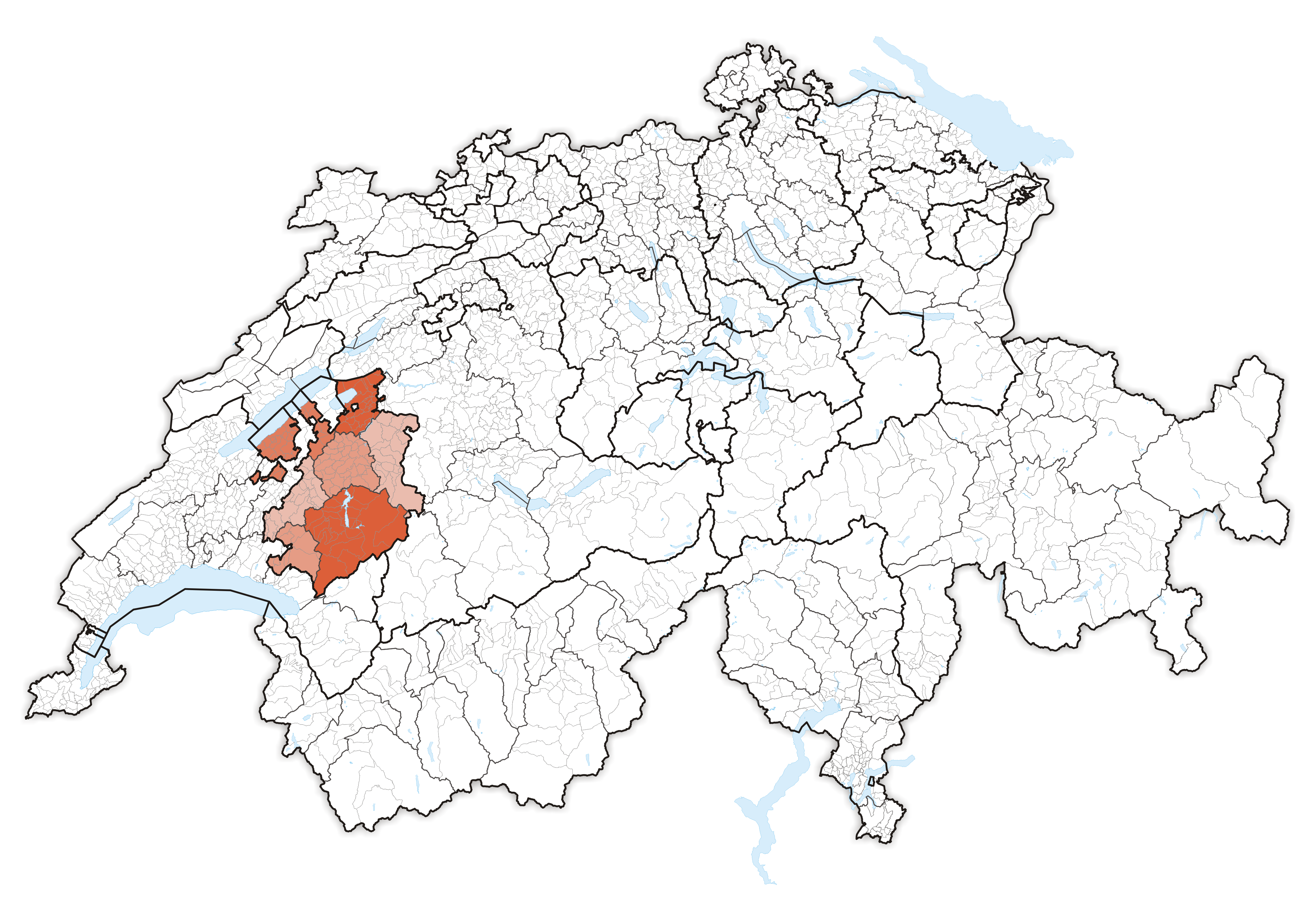 Canton Freiburg